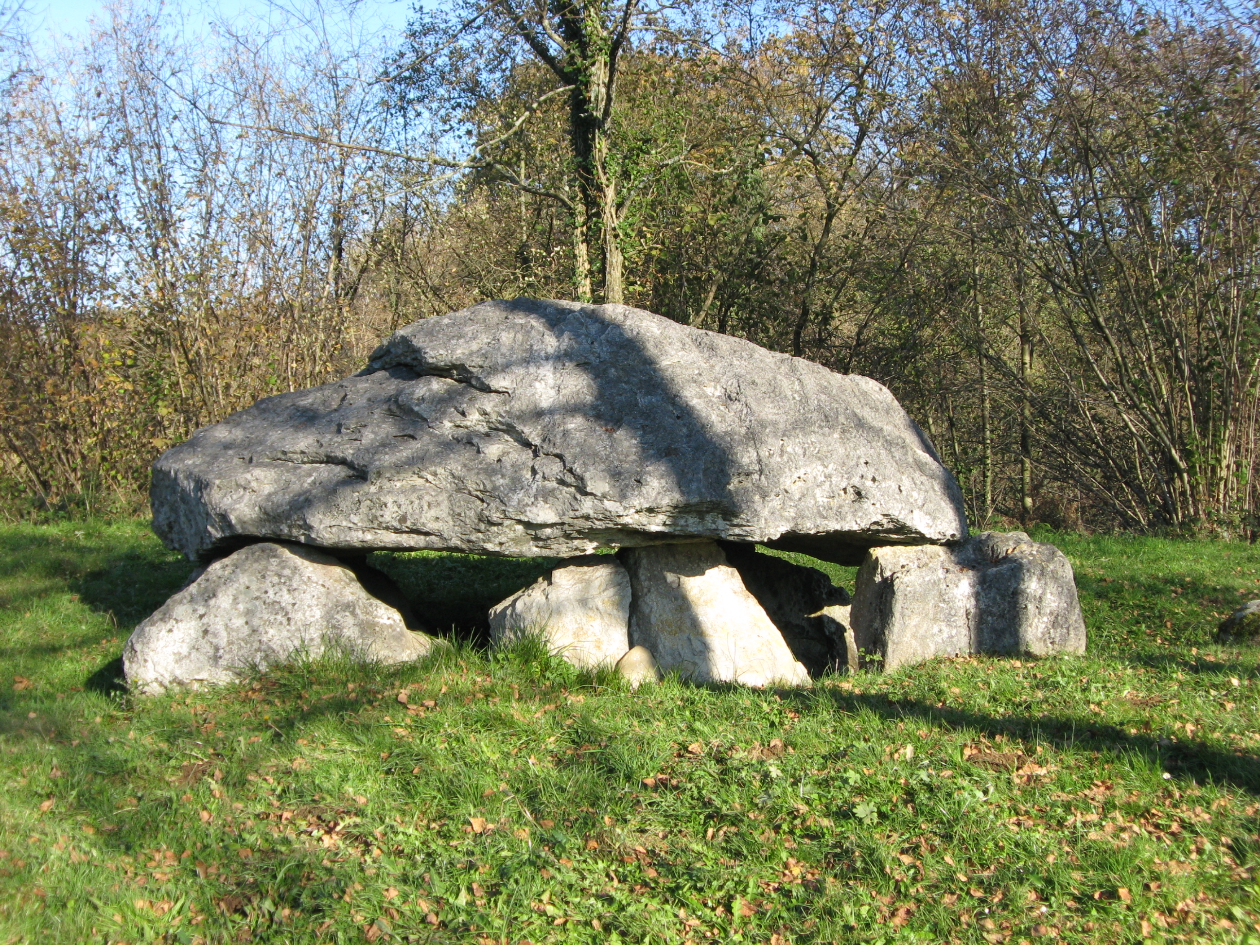 Dolmen de Buzy en bordure de la D920 (Pyrénées-Atlantiques) (Pyrénées).